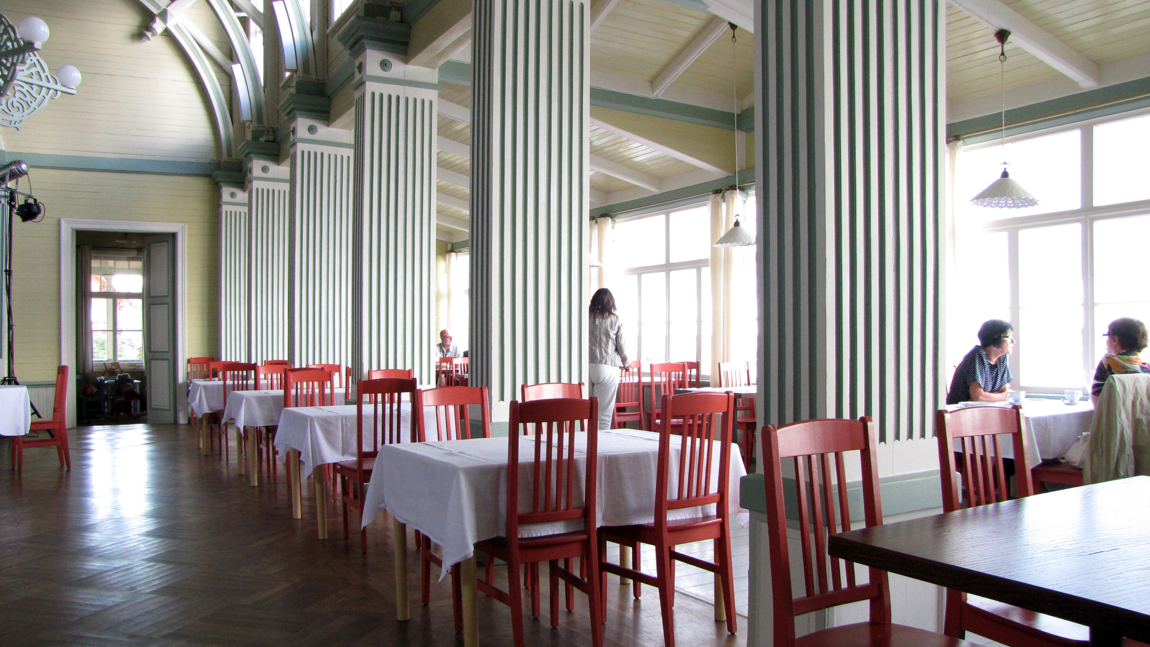 Haapsalu kuursaal, 19. saj.